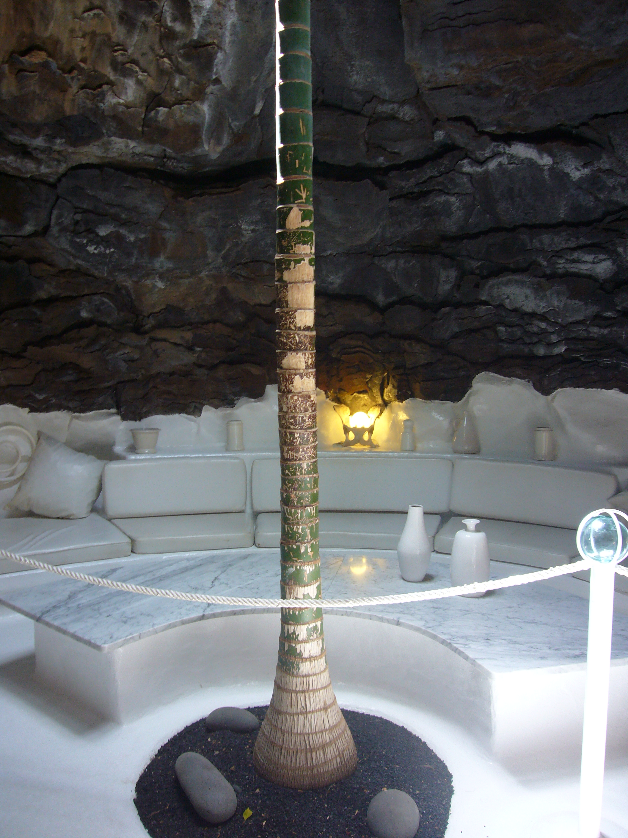 Binnen in het huis van Manrique. De foto is genomen in een ondergrondse 'lavabel' die is uitgehouwen en omgebouwd tot een salon. In artikel: César Manrique.